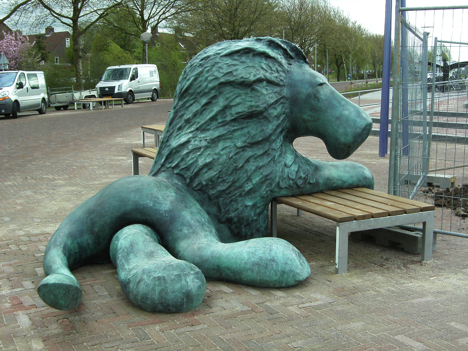 Mamma ik zie een Leeuw, kunstwerk bestaande uit een hert aan de ene en een leeuw aan de andere zijde van de spoorwegovergang. Dedden & Keizer (Spacecowboys) maakten het in 2012 voor het stationsplein te Duiven